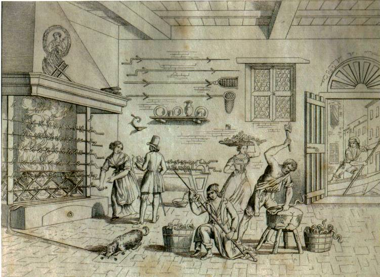 Traitement de l'anguille dans une manufacture au XIX siècle à Comacchio